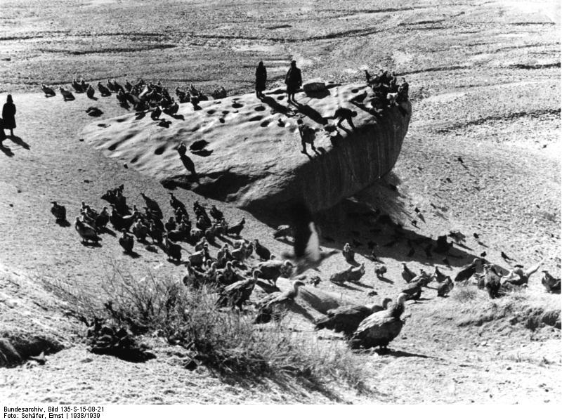 Lhasa, Leichenzerschneidung und Geier